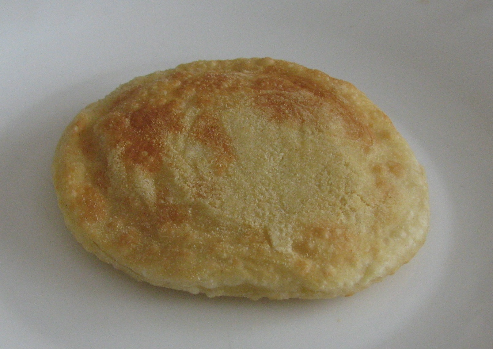 Una Seada in attesa del miele